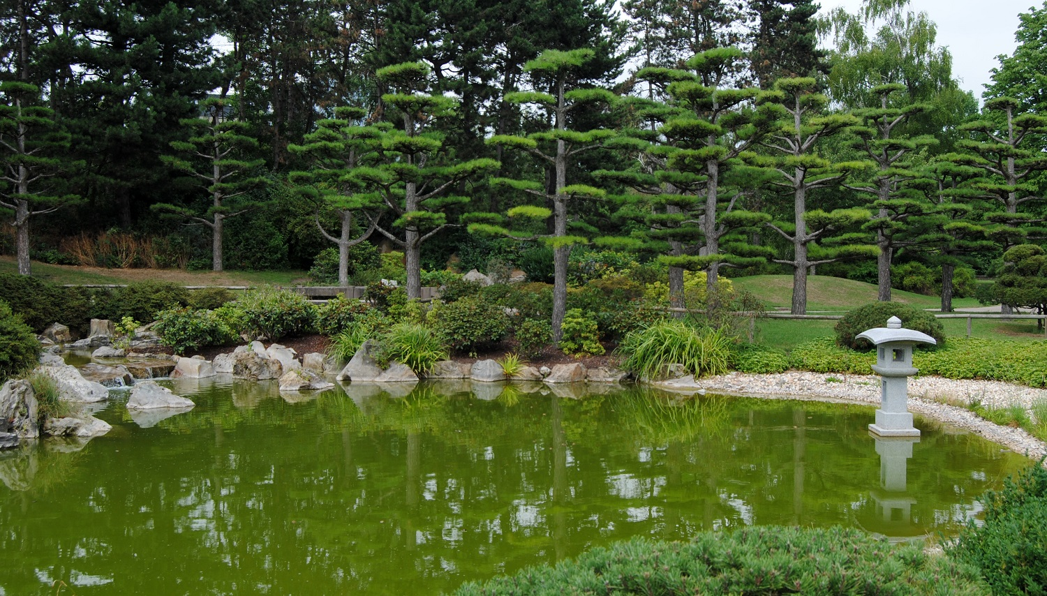 Japoniškas sodas Diuseldorfe